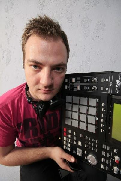 Sergio Galoyan (Галоян, Сергей)